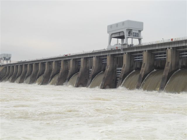 Kentucky Dam